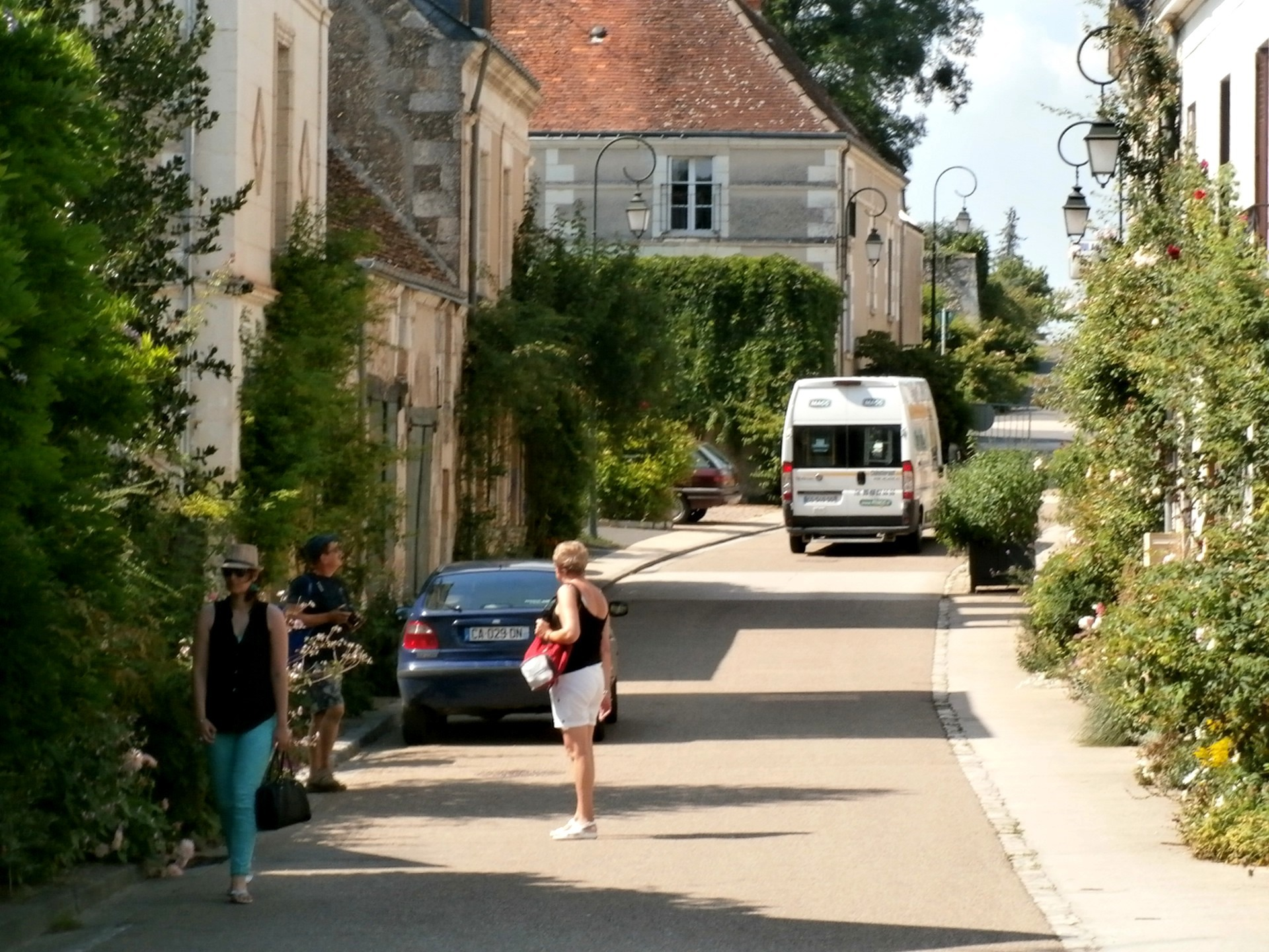 la rue du Lavoir à Chédigny